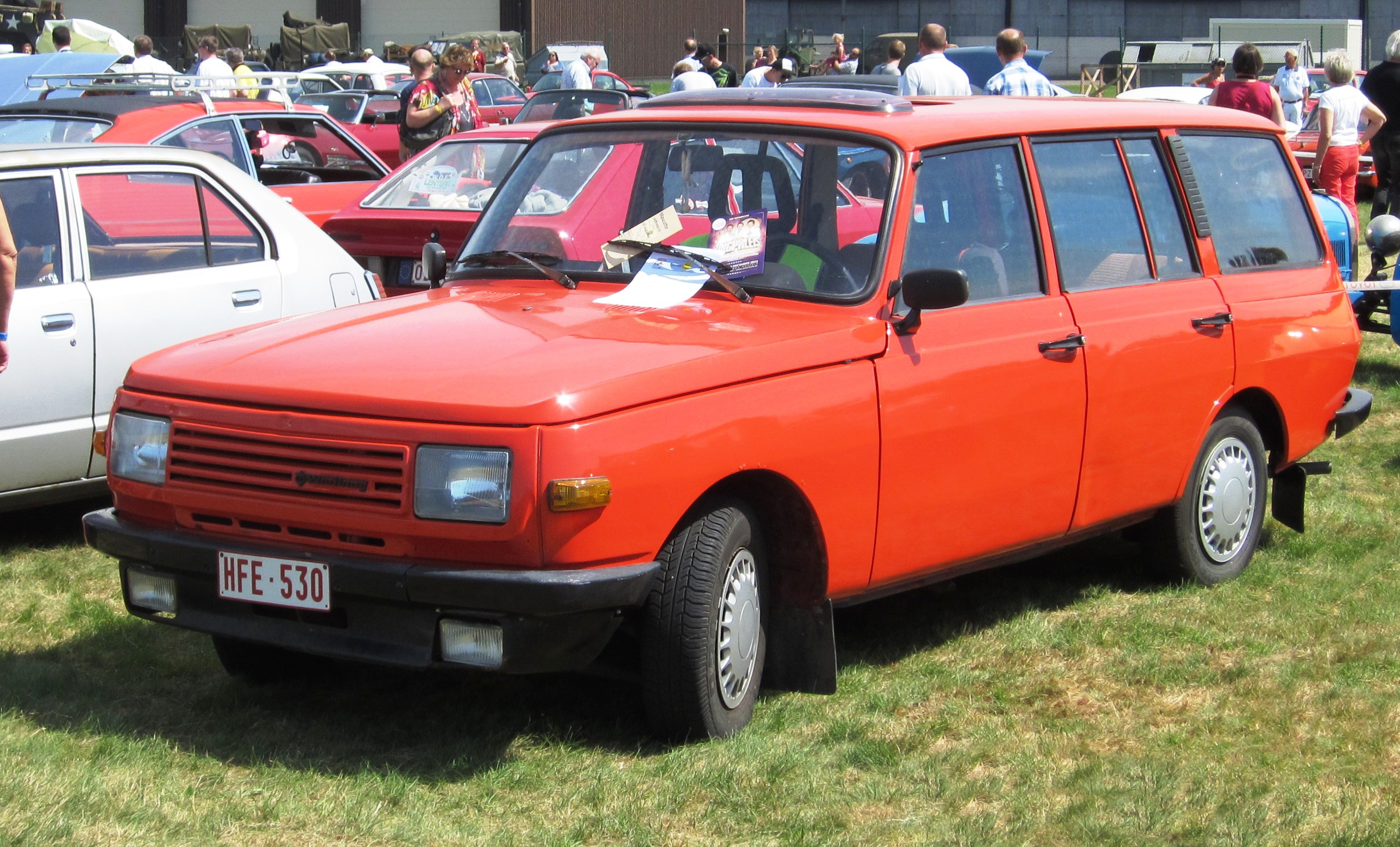 Wartburg 353 Tourist in Belgien